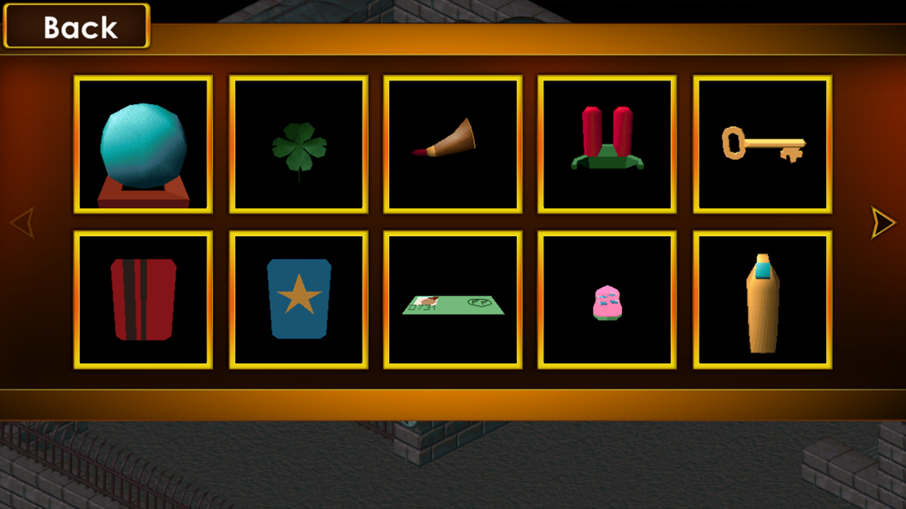 Capture d'écran du jeu vidéo Little Big Adventure, ici dans son portage pour appareils mobiles (2014).